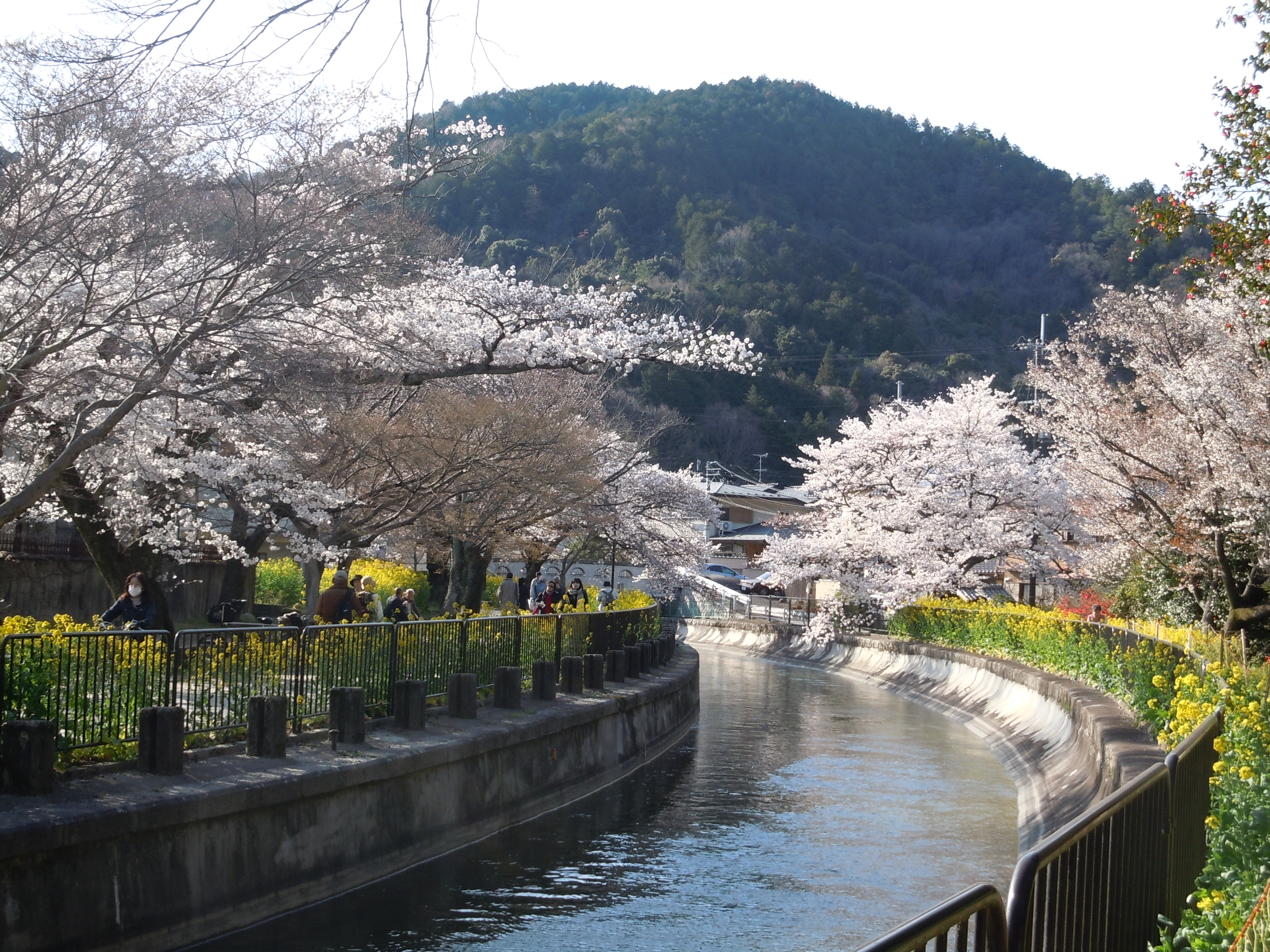 琵琶湖疏水とサクラ。山科区、琵琶湖疏水にて。